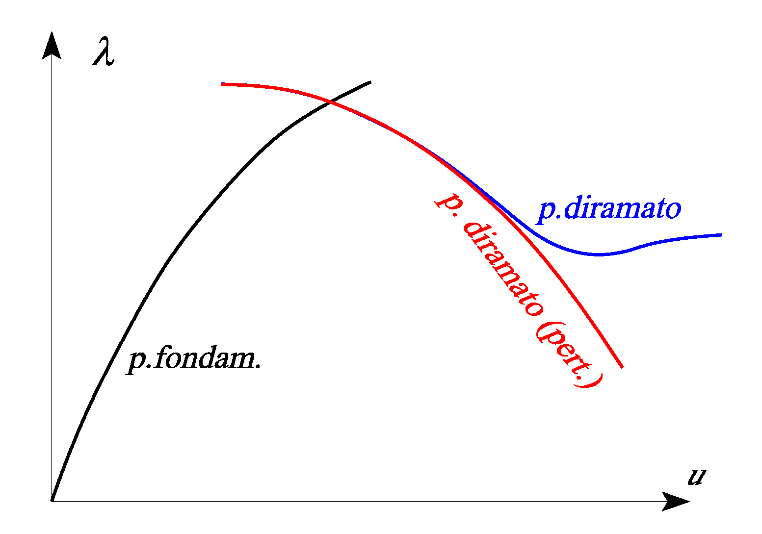 Percorso di equilibrio biforcato ricostruito asintoticamente